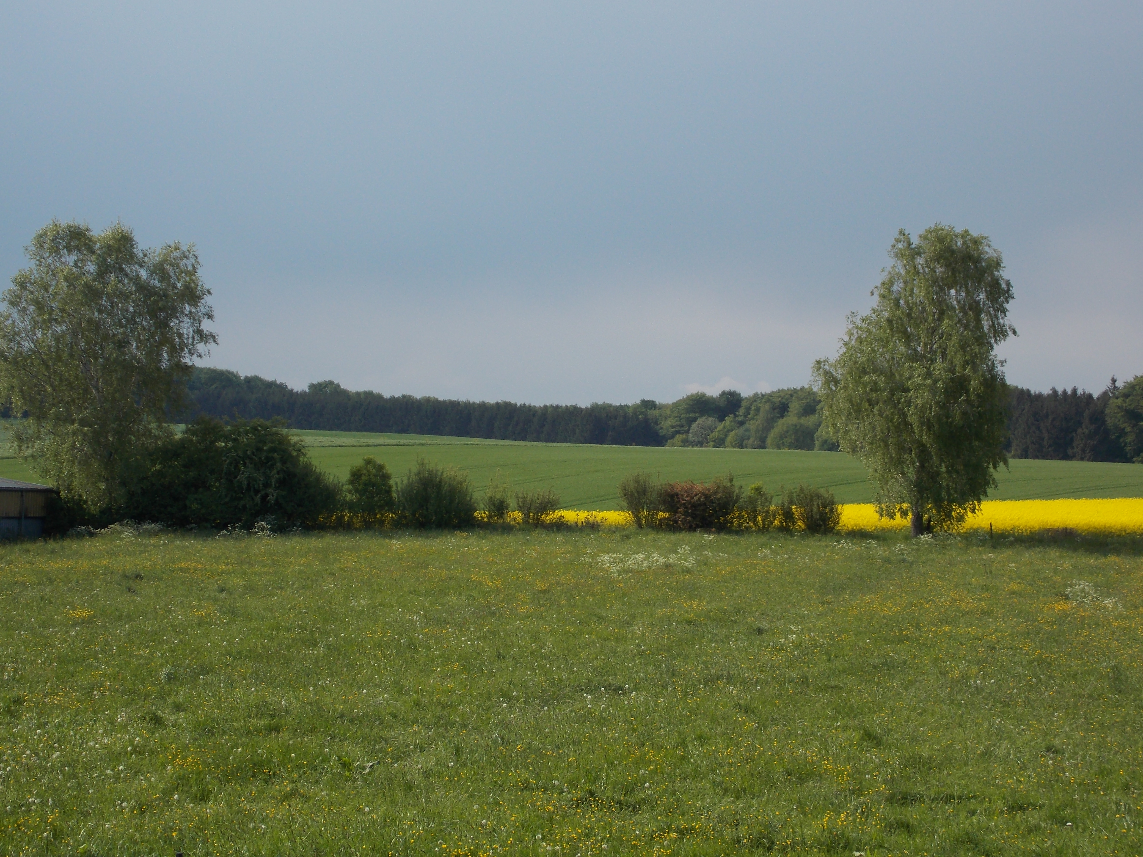 Blick auf die Felder und den Wald im Norden von Fingig